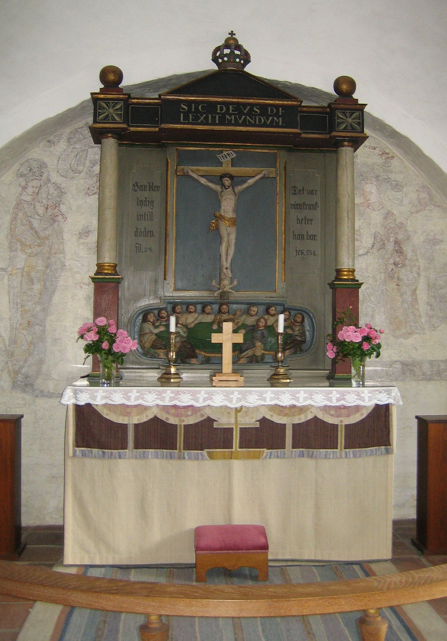 Ivö kyrka, altar